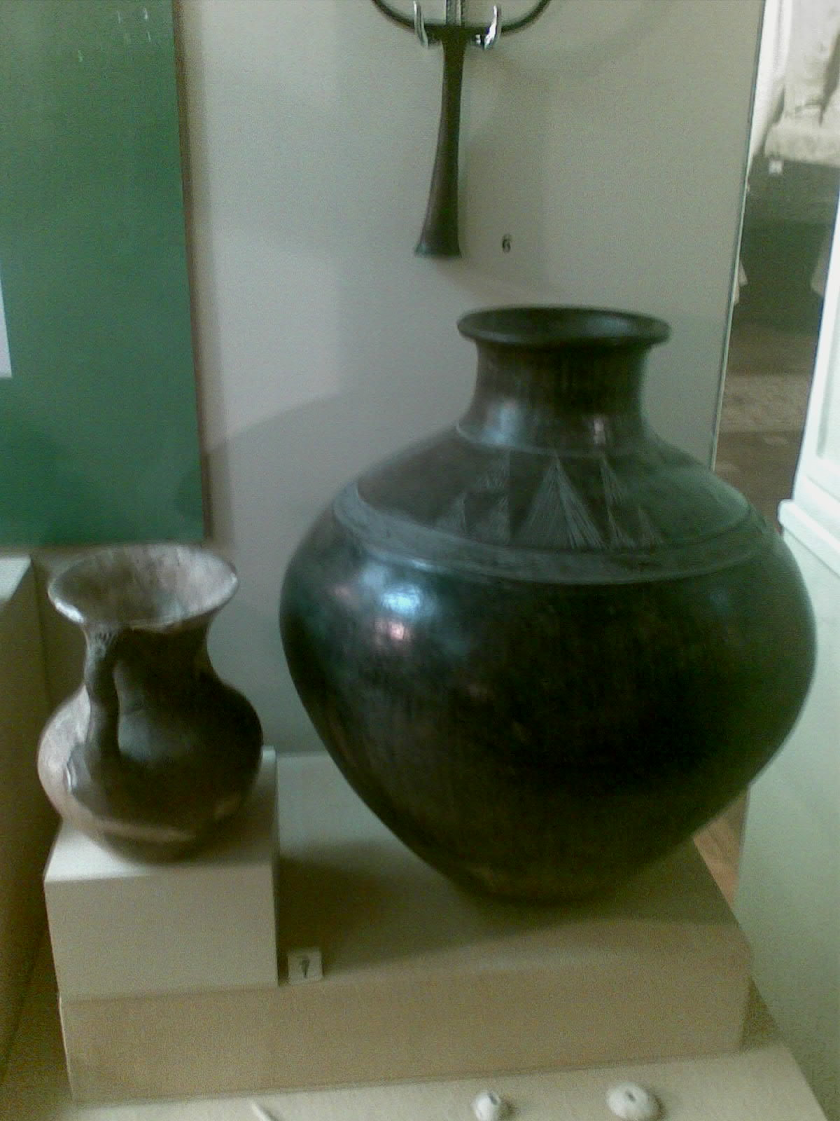 Daşsalahlı saxsı qab